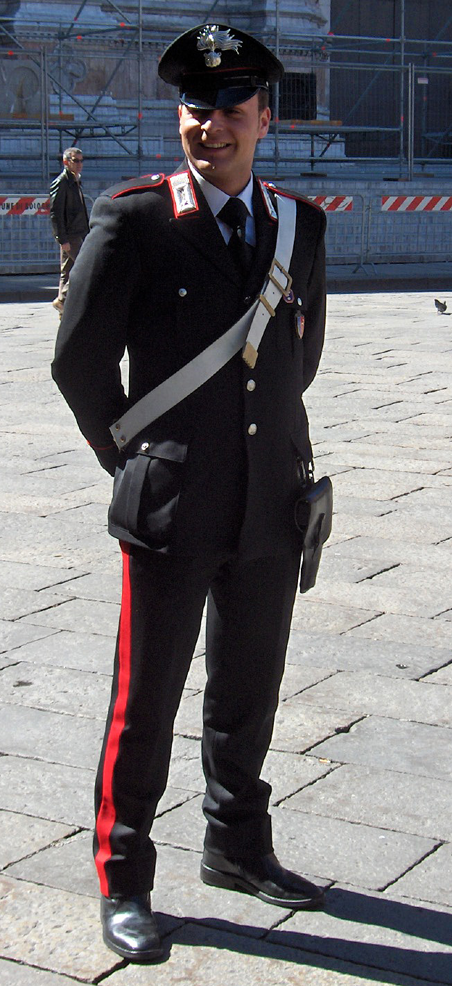 Italian carabinieri